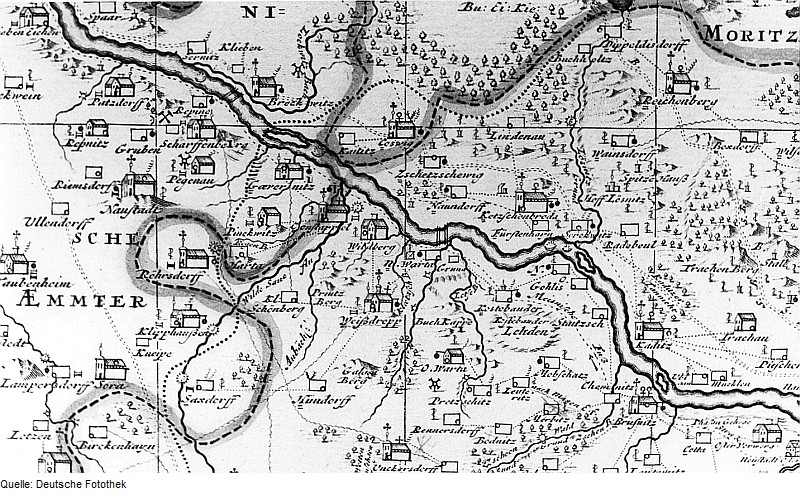 Original image description from the Deutsche FotothekKlipphausen-Scharfenberg. Ausschnitt aus: Atlas von Schenk, Karte Nr. 3, 1753